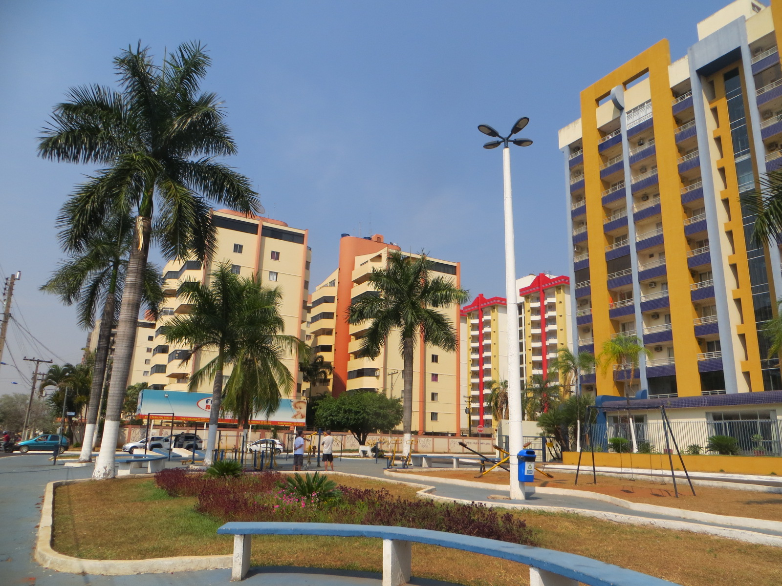 Prédios em Caldas Novas, Goiás, Brasil.